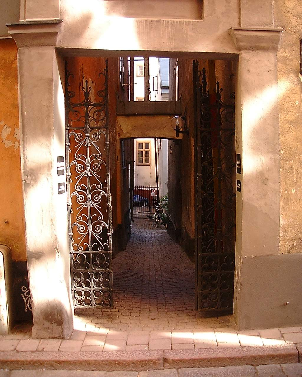 Remains of a medieval alley at 3-5, Österlånggatan (Bootes), Gamla stan, Stockholm.